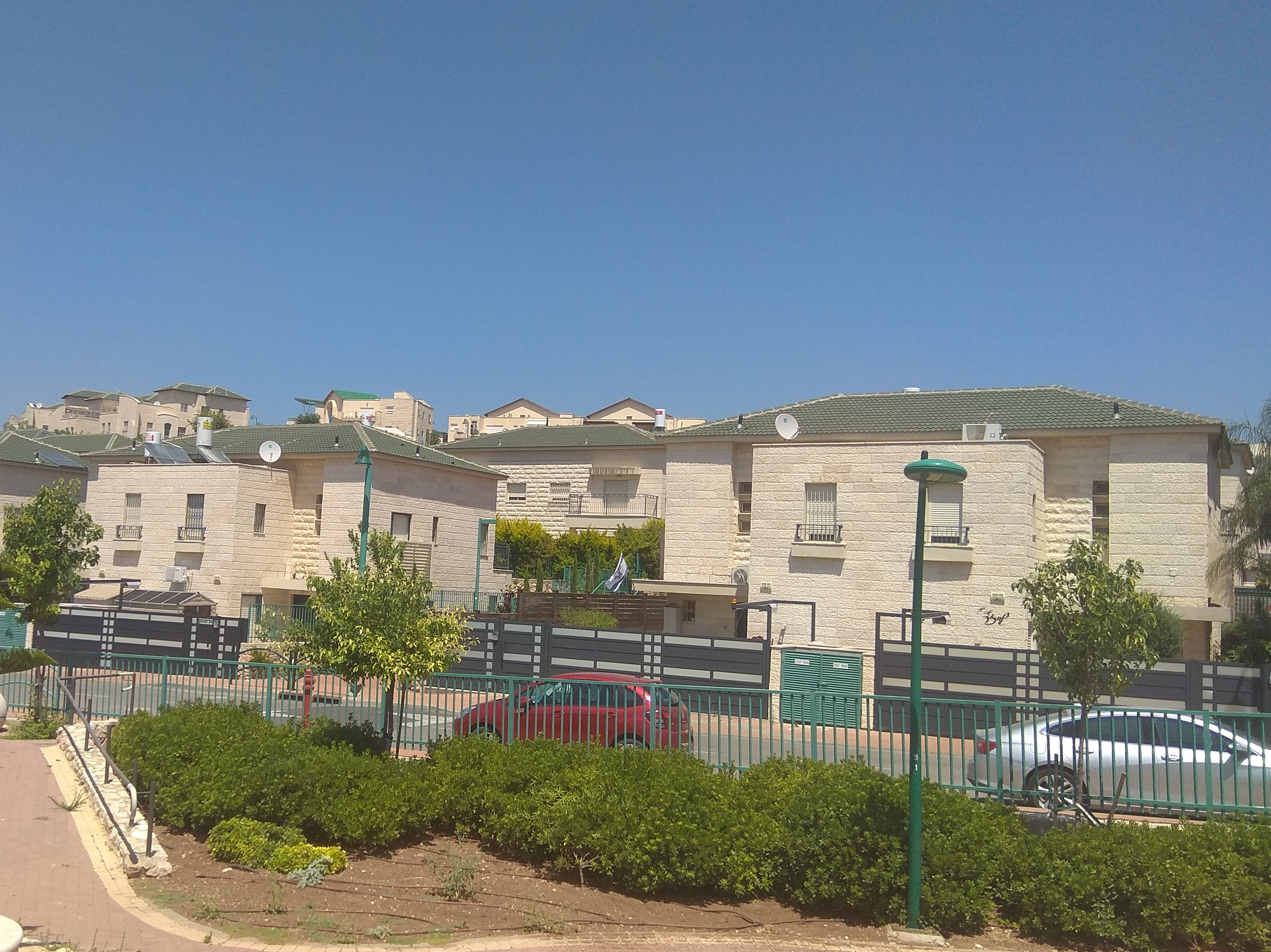 שכונת הגגות הירוקים